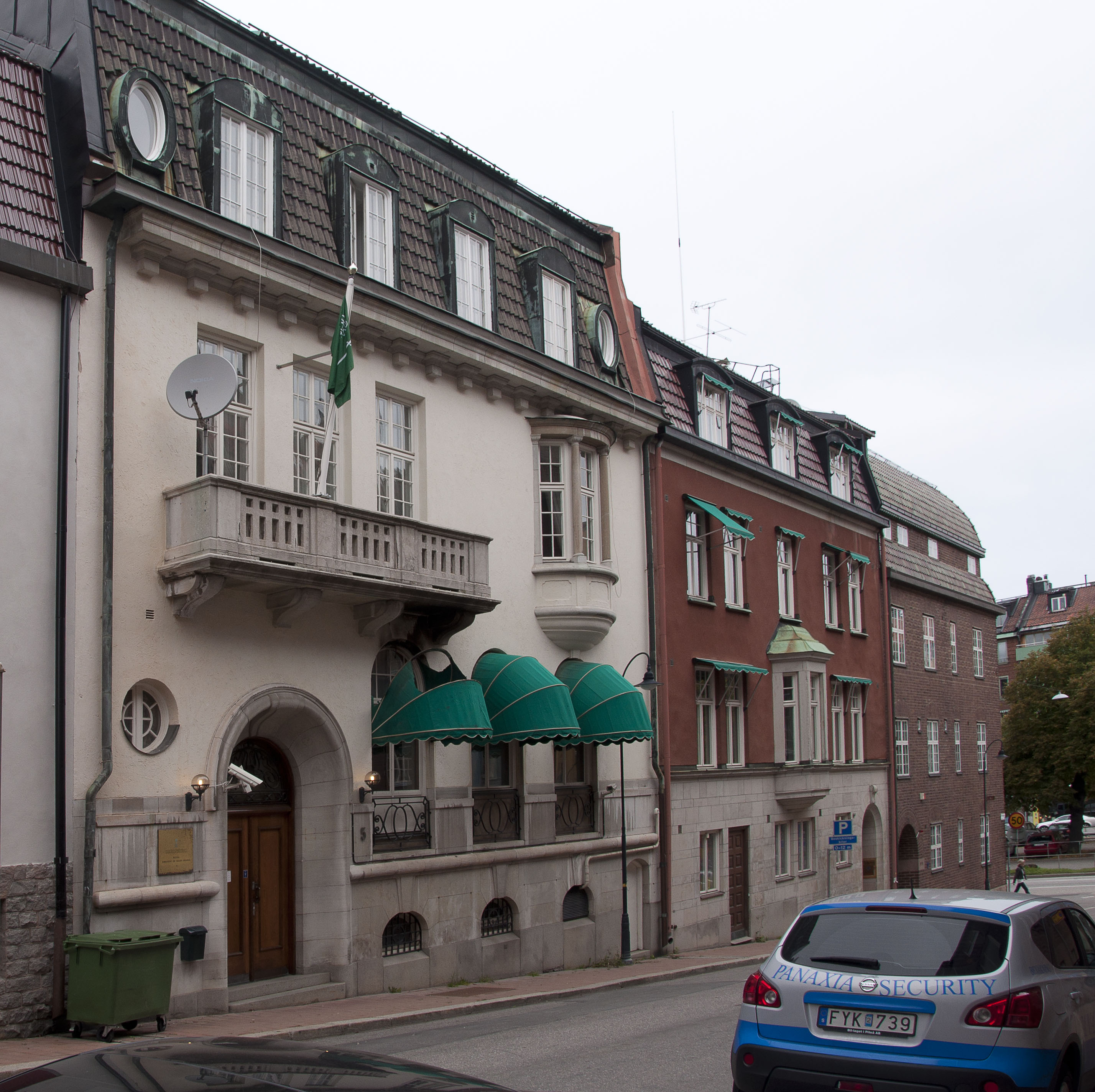 Sköldungagatan 5 (Trädlärkan 8), Stockholm: Byggnadsår 1909-10, arkitekter Hagström & Ekman, byggherre G Nygren, byggmästare M Eriksson. Byggnaden fungerar idag som Saudiarabiens ambassad i Stockholm. De brända markiserna vittnar om det attentat Ambassaden utsattes för 2009 då en man hälde ut brännbar vätska och satte eld på en bil utanför bygganden Från vänster syns därefter fastigheterna; Sköldungagatan 7 (Trädlärkan 7): Byggnadsår 1910-11, arkitekt C A Carlsson, byggherre H Brusell, byggmästare H Fallström. Sköldungagatan 9/Valhallavägen 64 (Trädlärkan 6): Byggnadsår 1909-10, arkitekt Erik Hahr, byggherre E Asplund, byggmästare D E Thorsén